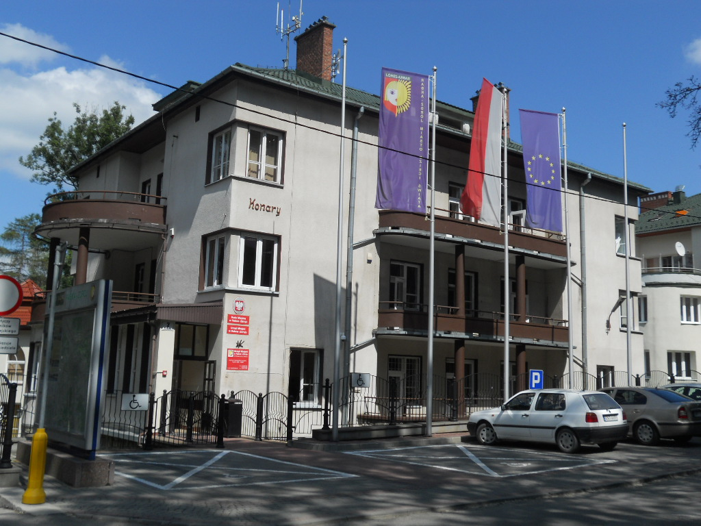 Willa Konary (Urząd Miasta Rabki-Zdroju) przy Ulicy Parkowej 2 w Rabce-Zdroju.